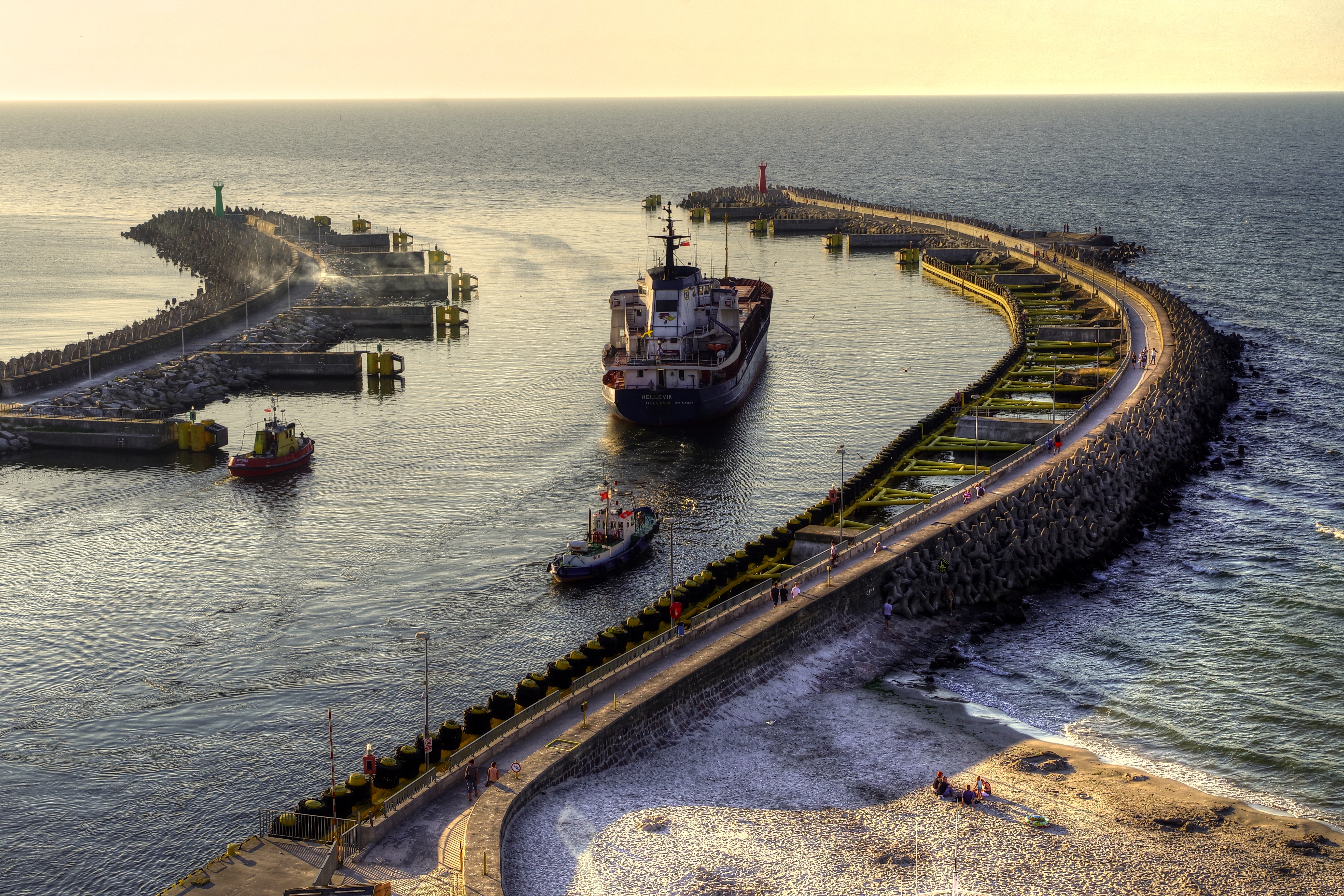 Kołobrzeg, ujście Iny